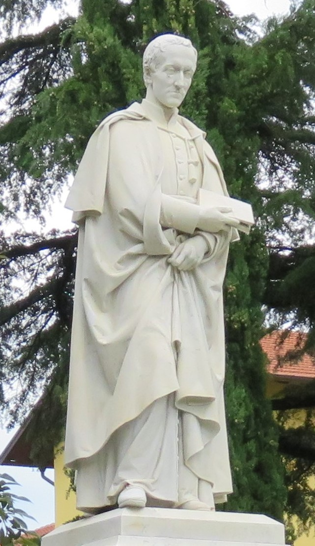 Monumento a Rosmini, in Corso Rosmini a Rovereto, di fronte alla sua casa natale